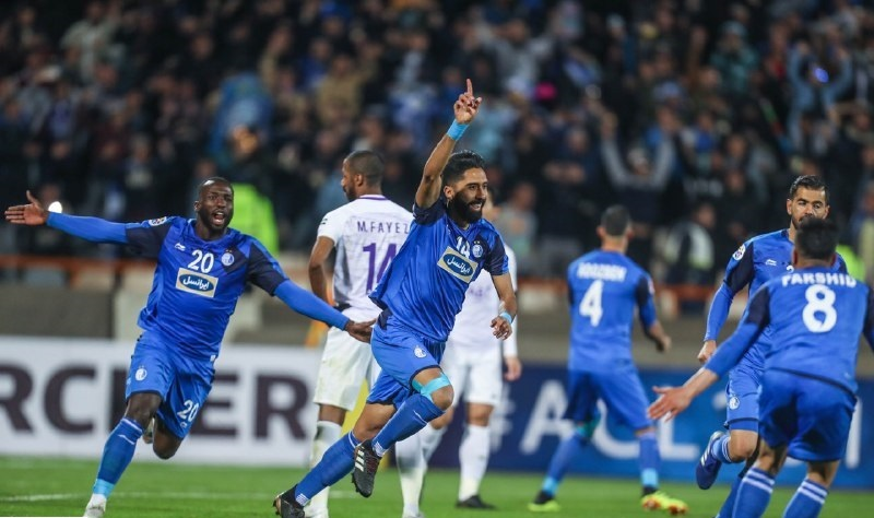 استقلال در دومین دیدار مرحله گروهی لیگ قهرمانان آسیا مقابل العین